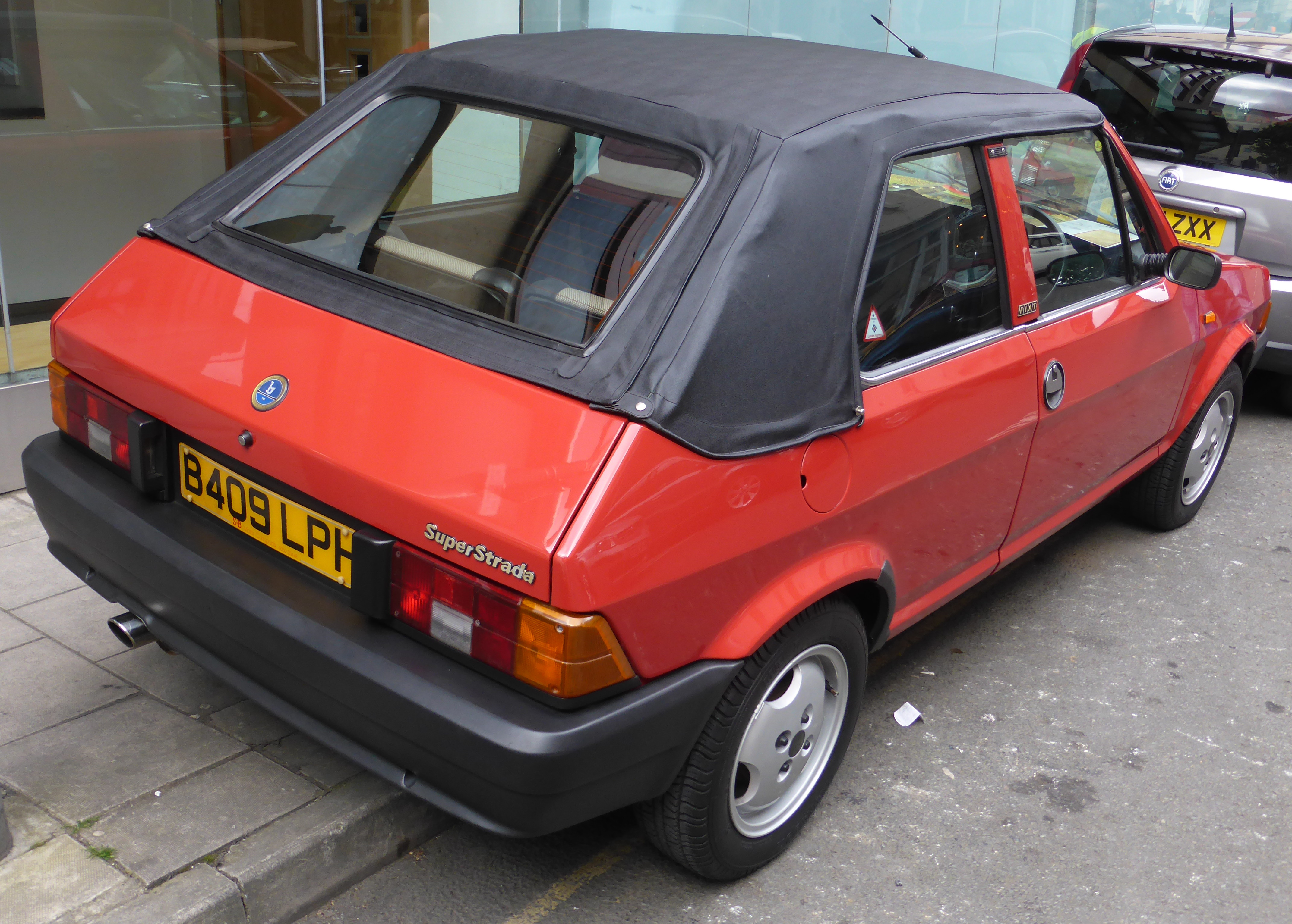 Bristol Italian AutoMoto Festival